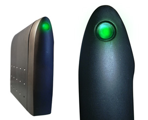 Le coq hard drive made by électronique d2